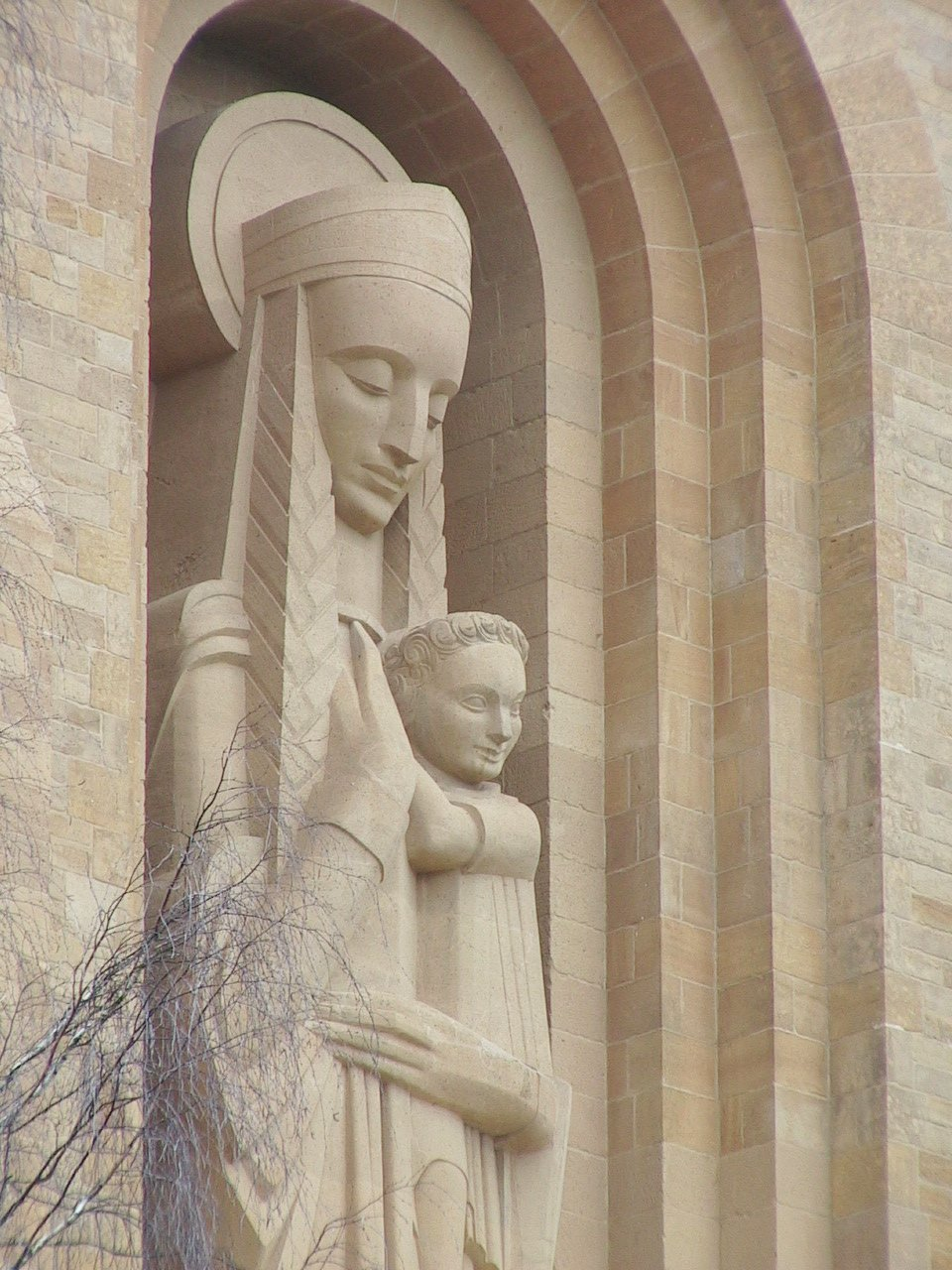 Statue monumentale de Notre-Dame d'Orval à l'abbaye d'Orval (Belgique). Détail du visage.